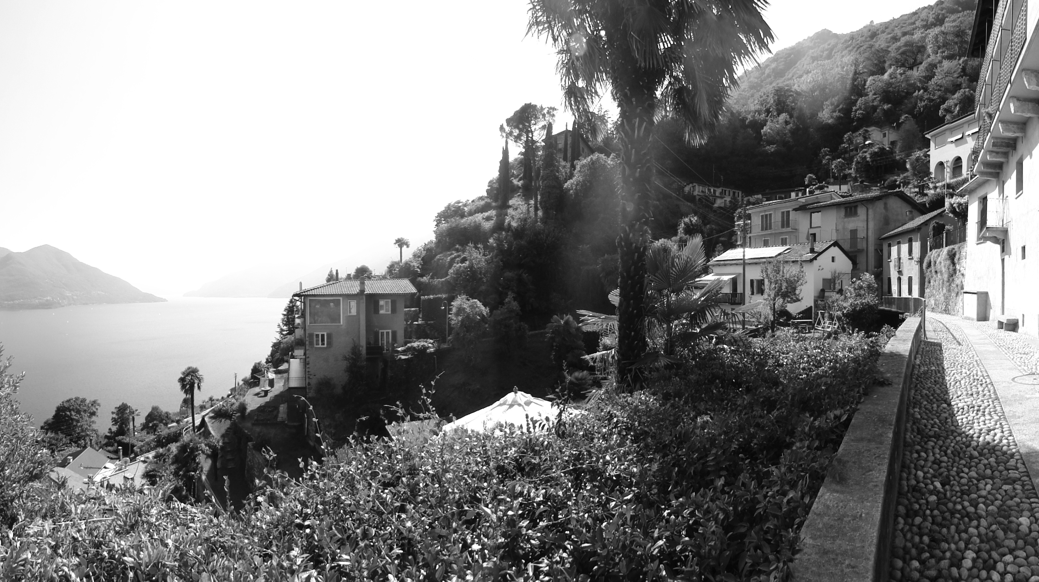 Schweiz - Ronco sopra Ascona (TI). Via Antonio Ciseri, Blick von der Wegesbalkonade in Richtung Westen